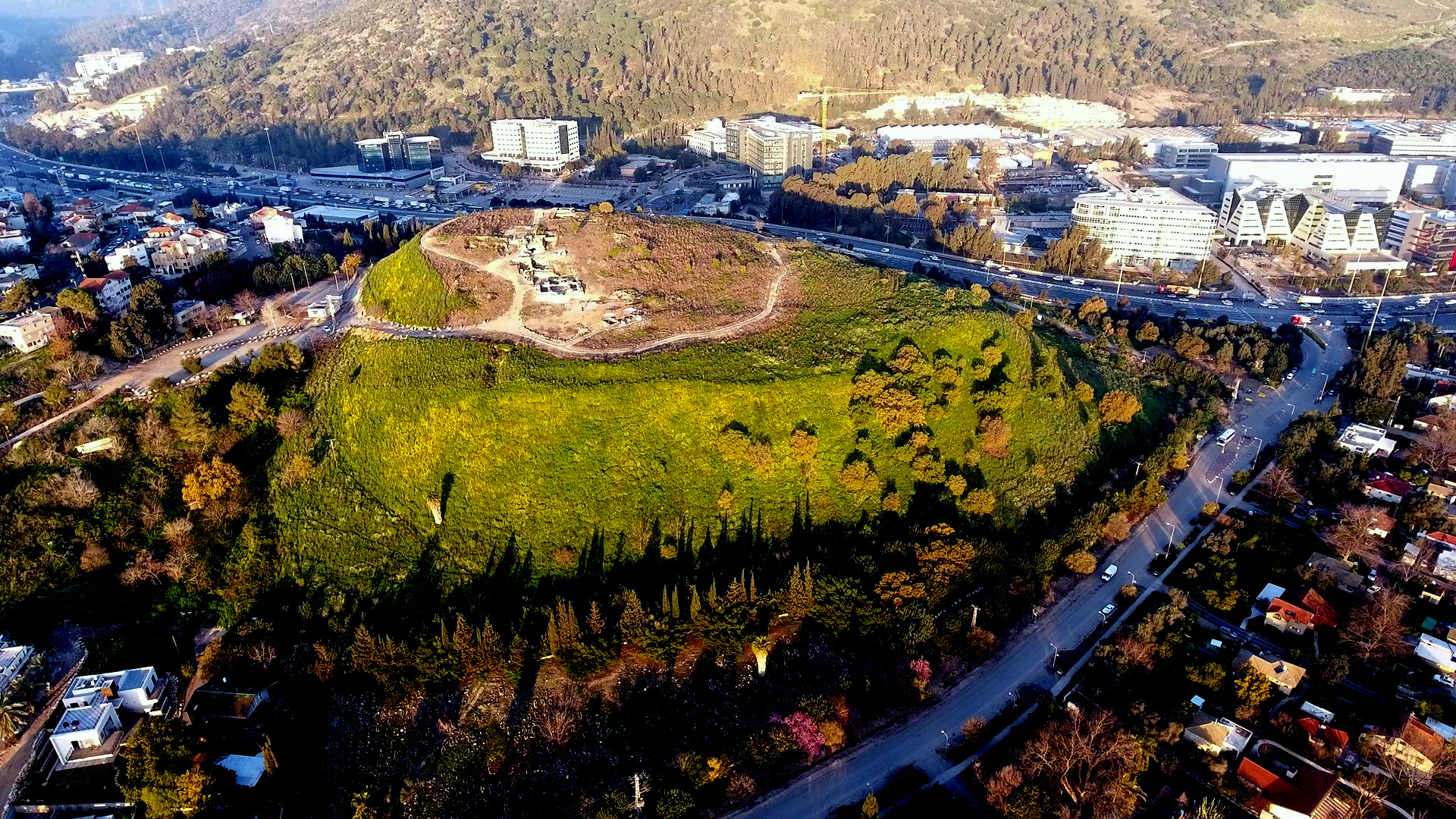 תֵּל יָקְנְעָם הוא תל גדול הנמצא בסמוך ליקנעם של ימינו, על גבול עמק יזרעאל ורכס הכרמל. תל יקנעם ממוקם בסמוך לאחת מהדרכים החשובות ביותר בעת העתיקה אשר עברה בואדי מילק וקישרה בין דרך הים (ויאה מריס) והדרך המובילה צפונה לעיר צור. נקודה זאת הקנתה ליקנעם העתיקה ערך אסטרטגי וכלכלי רב. התל ממוקם בגובה 70 מטר מעל פני הואדי.